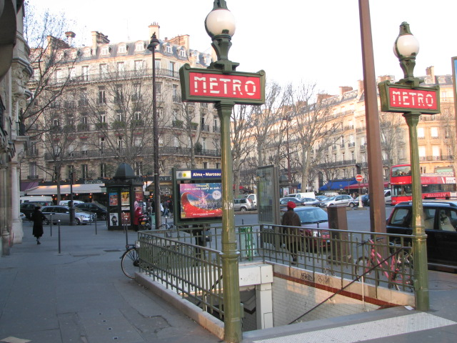 Bouche de métro Alma-Marceau, place de l'Alma, Paris